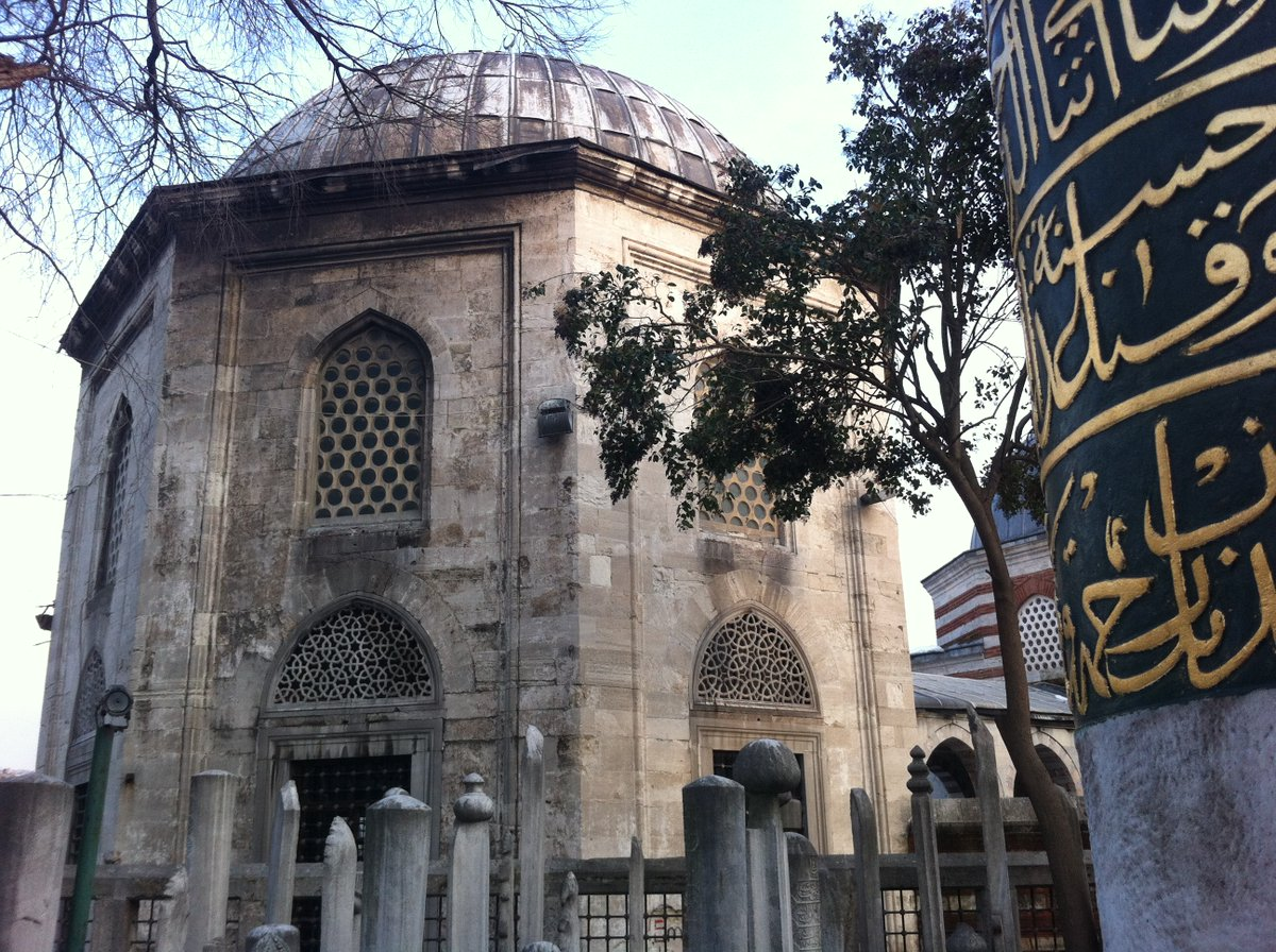 Sokullu Mehmed Paşa Türbesi-Eyüp-İstanbul